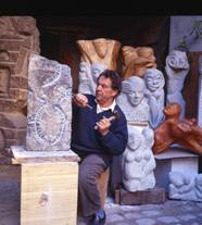 Atelier de L'artiste